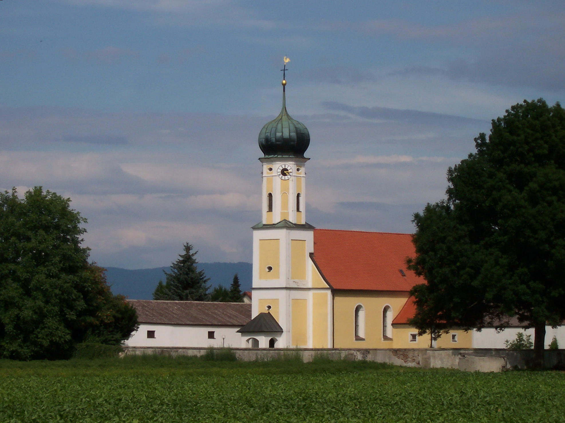 Aiterhofen, Amselfing. Katholische Filialkirche St. Stephanus, erbaut 1666; mit Ausstattung; Turmobergeschosse 1776.